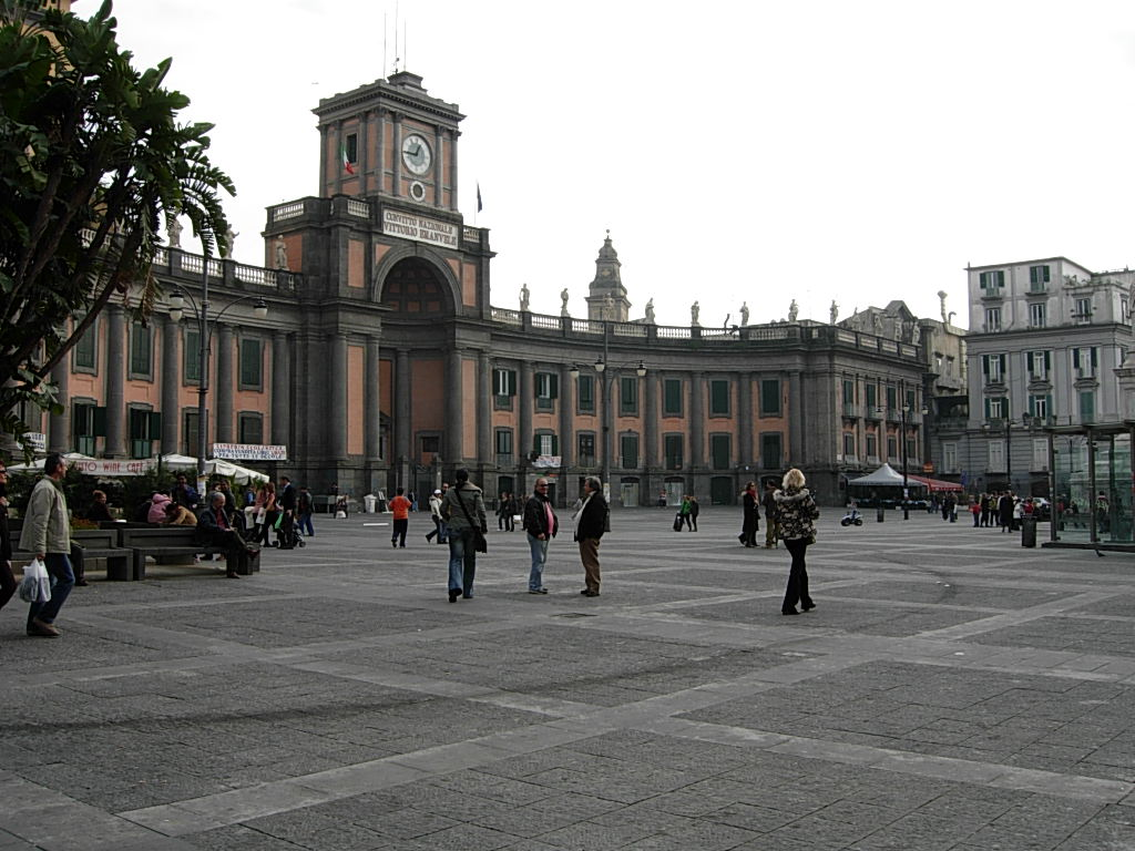 Piazza Dante in Napoli Foto personale